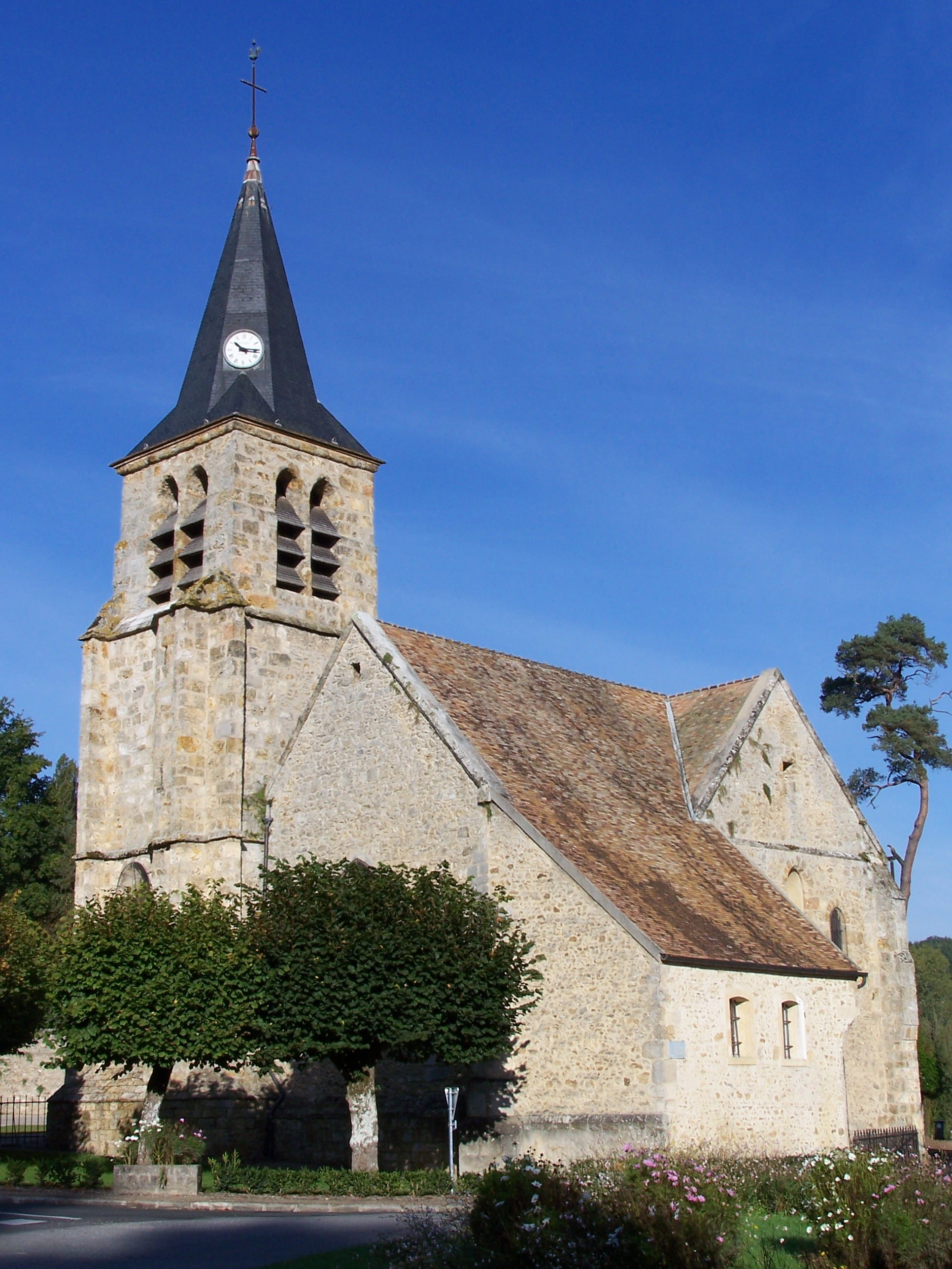 Église Saint-Jean-Baptiste de Choisel (Yvelines, France)